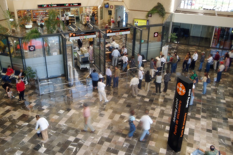 Aeropuerto de Guanajuato